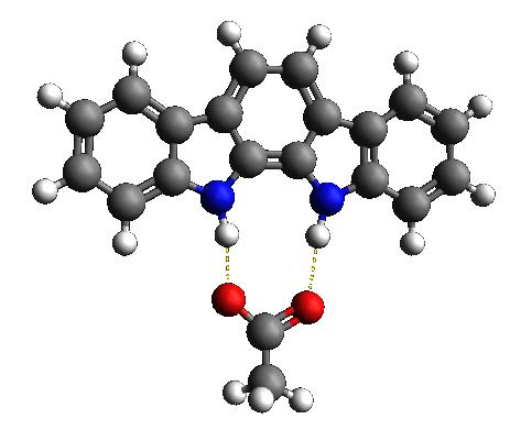 Indolokarbasooli sensor-anioon kompleks atsetaadiga, programmiga Avogadro